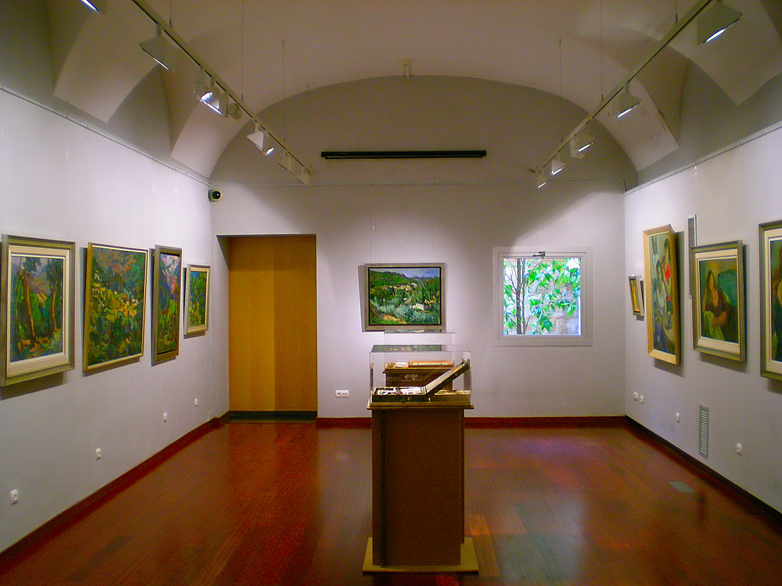 Sala d'exposicions temporals del Museu Arxiu de Sant Andreu de Llavaneres